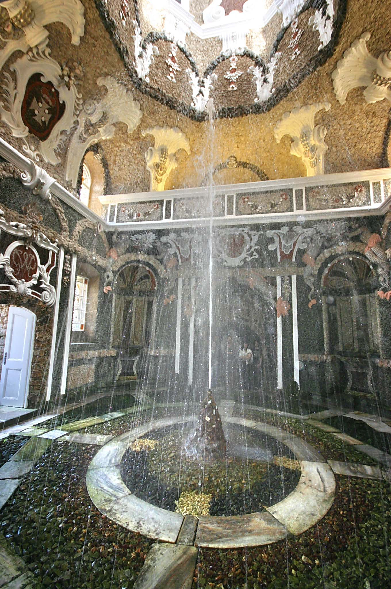 Bayreuth, Grotte in der Eremitage, Springbrunnen, Altes Schloss